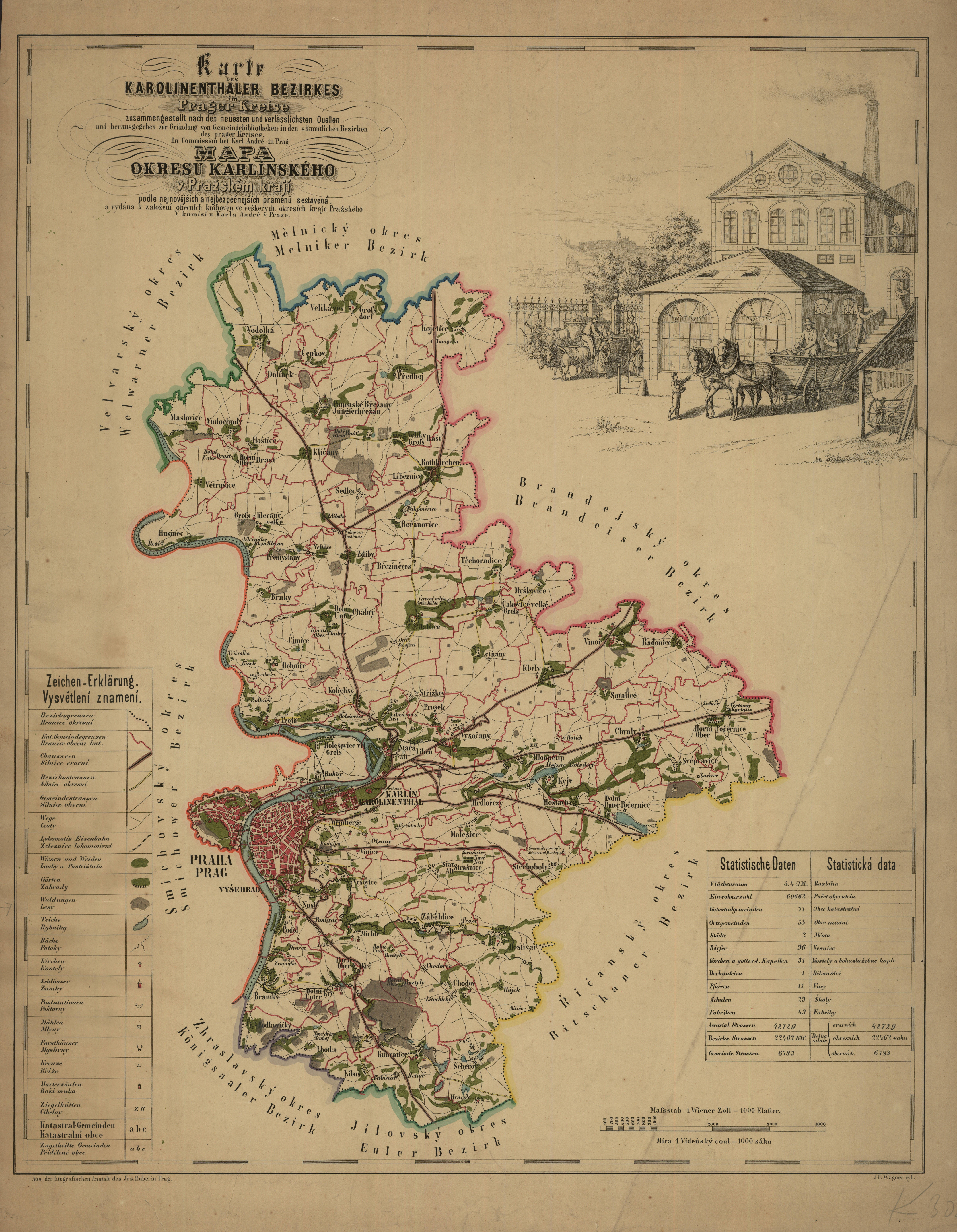 Mapa karlínského okresu z r. 1850 s obrazem cukrovaru